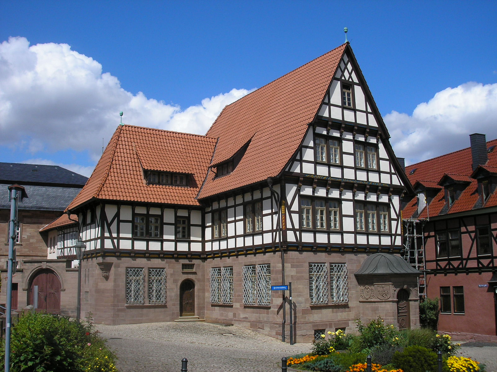 Ein Fachwerkhaus am Friedensplatz in Heiligenstadt (Thüringen) unmittelbar hinter dem Mainzer Schloss (erster Sitz der Sparkasse Heiligenstadt).